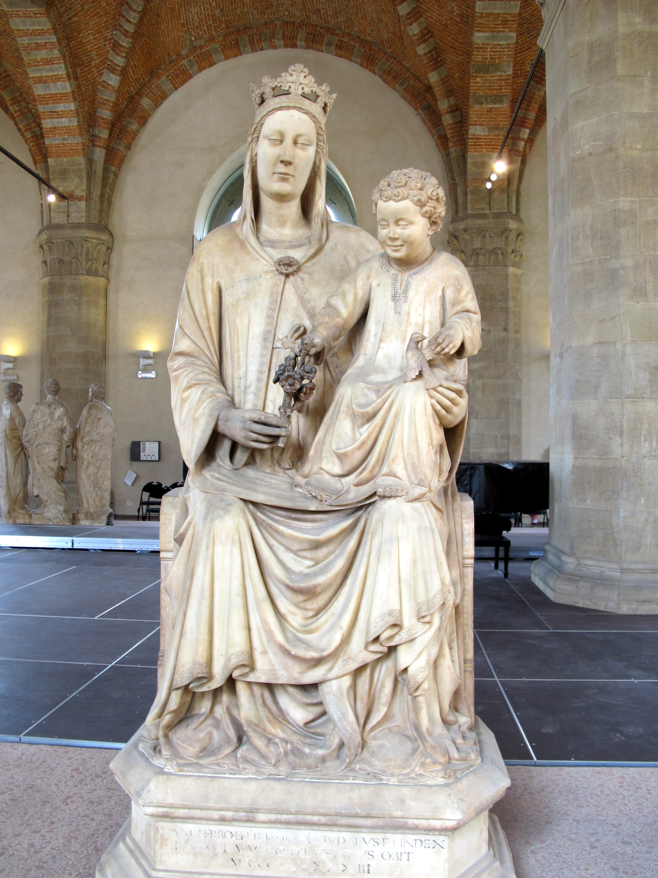 Museo di Orsanmichele - MIBAC This is a photo of a monument which is part of cultural heritage of Italy.